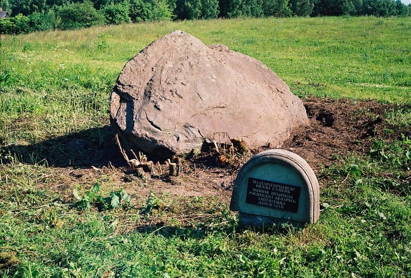 Полтараўшчына. Палтараўшчынскі вялікі камень